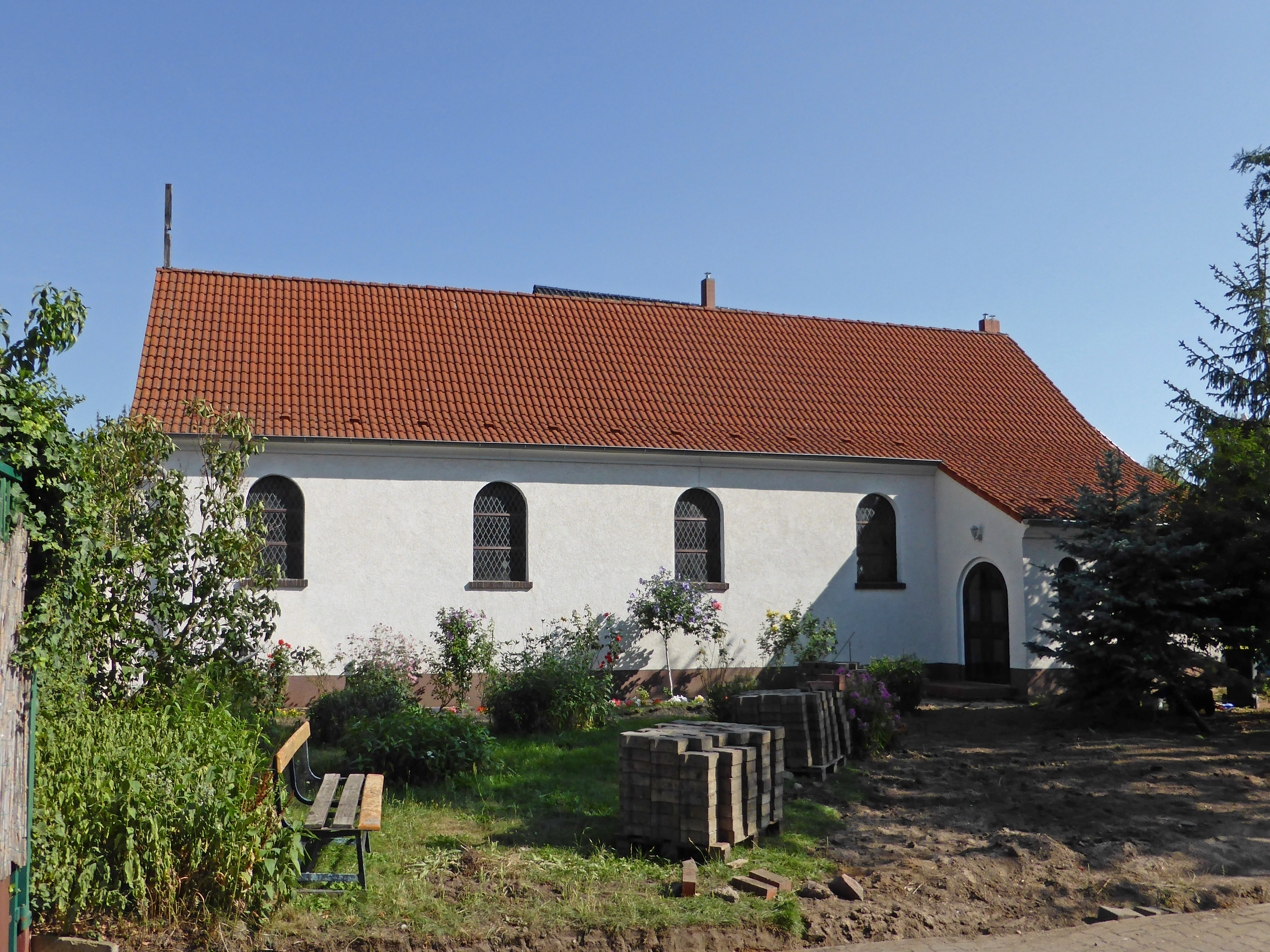 Römisch-katholische Rosenkranzkapelle in Rothensee, Stadtteil von Magdeburg.